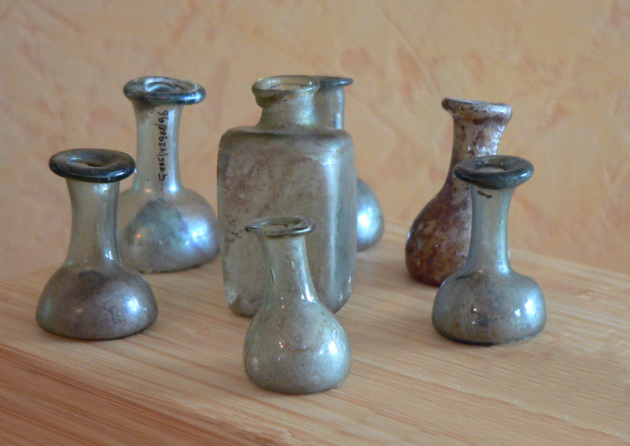 Apotherkerfläschchen als Fundstücke der Waldglashütte unter dem Hilsborn